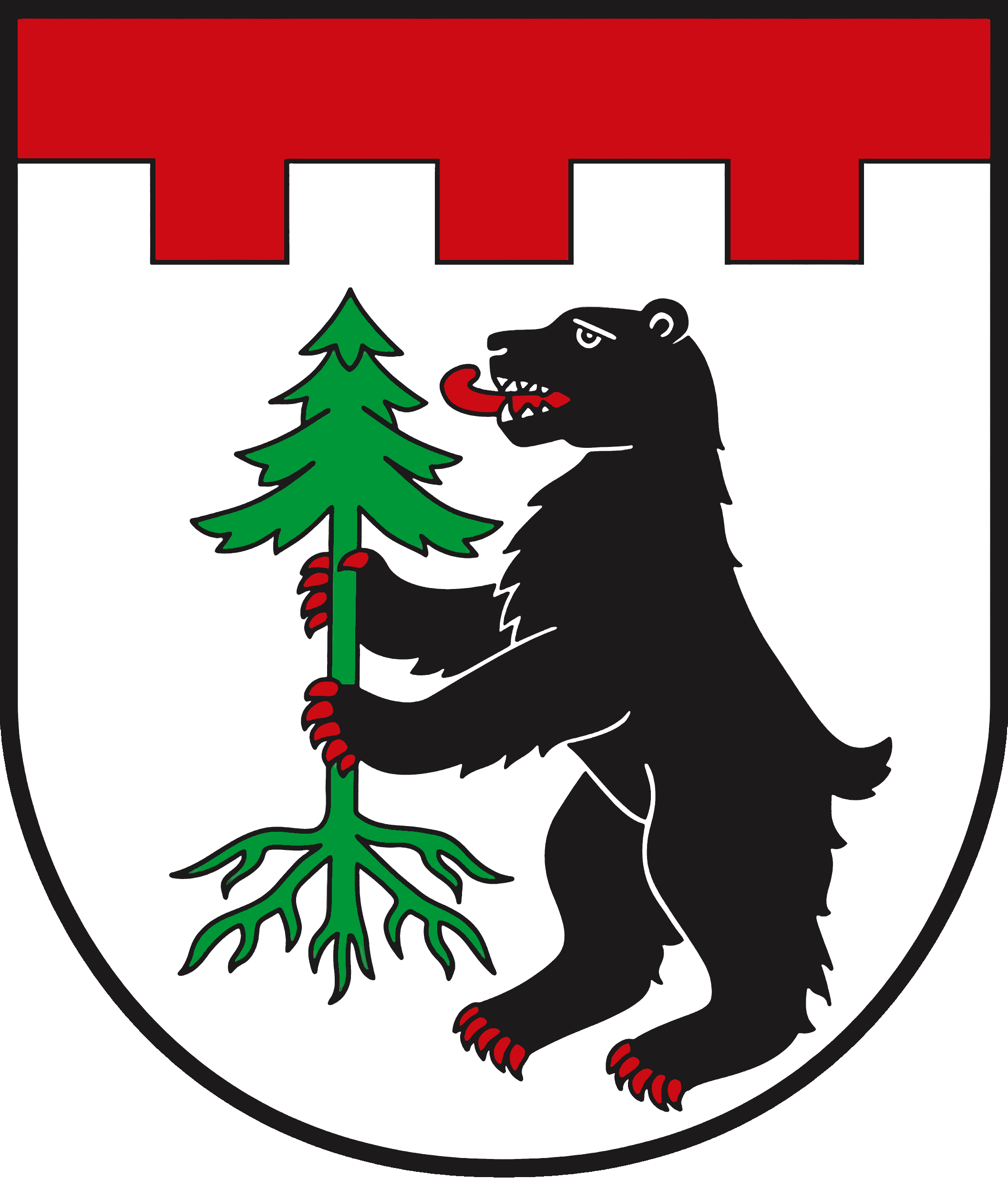 45. Verlautbarung der Steiermärkischen Landesregierung vom 26. April 2018 über die Verleihung des Rechtes zur Führung eines Gemeindewappens an die Marktgemeinde Sankt Gallen (politischer Bezirk Liezen)